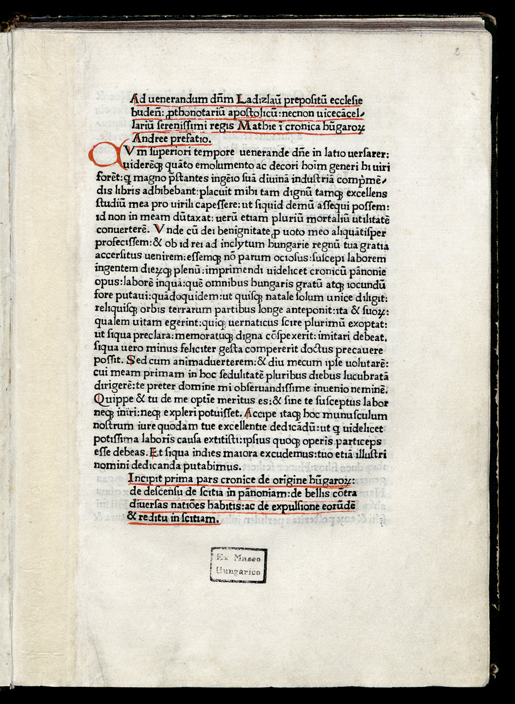 Chronica Hungarorum Finita Bude Anno Domini MCCCCLXXIII in vigiliapenthecostes per Andream Hess